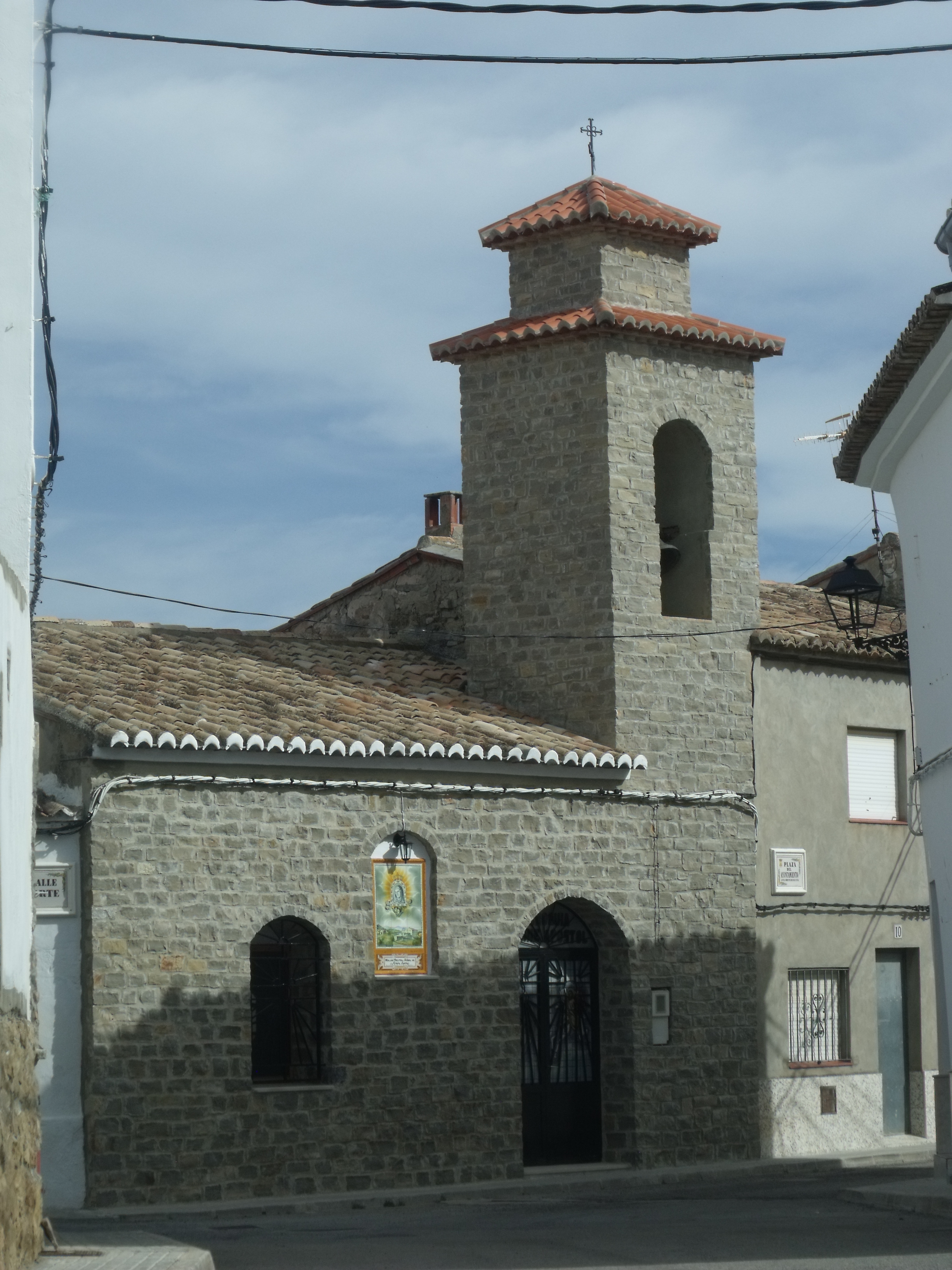 Iglesia parroquial de Santiago Apóstol